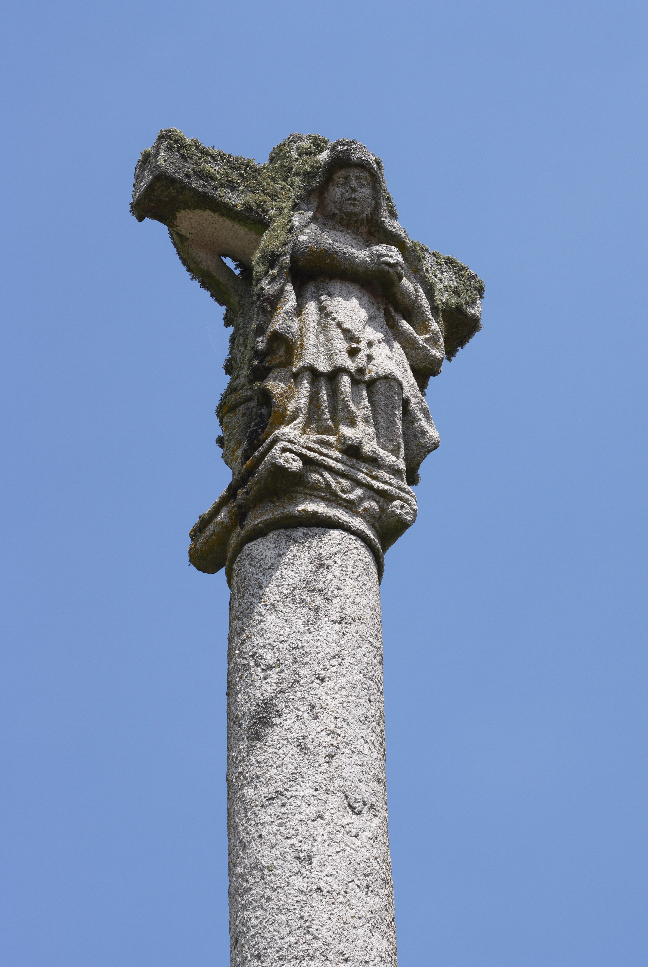 Cruceiro (Flurkreuz) in Baltar in der spanischen Provinz Ourense (Galicien)